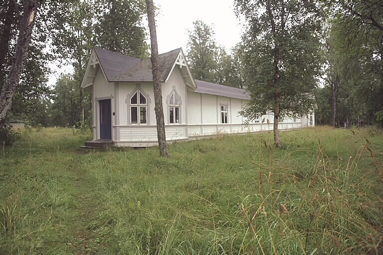 Kägelbanan.; Byggnadsverk; Idrottsplats; Kultur och nöjesliv